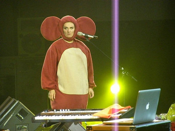 БКЗ Октябрьский,СПБ